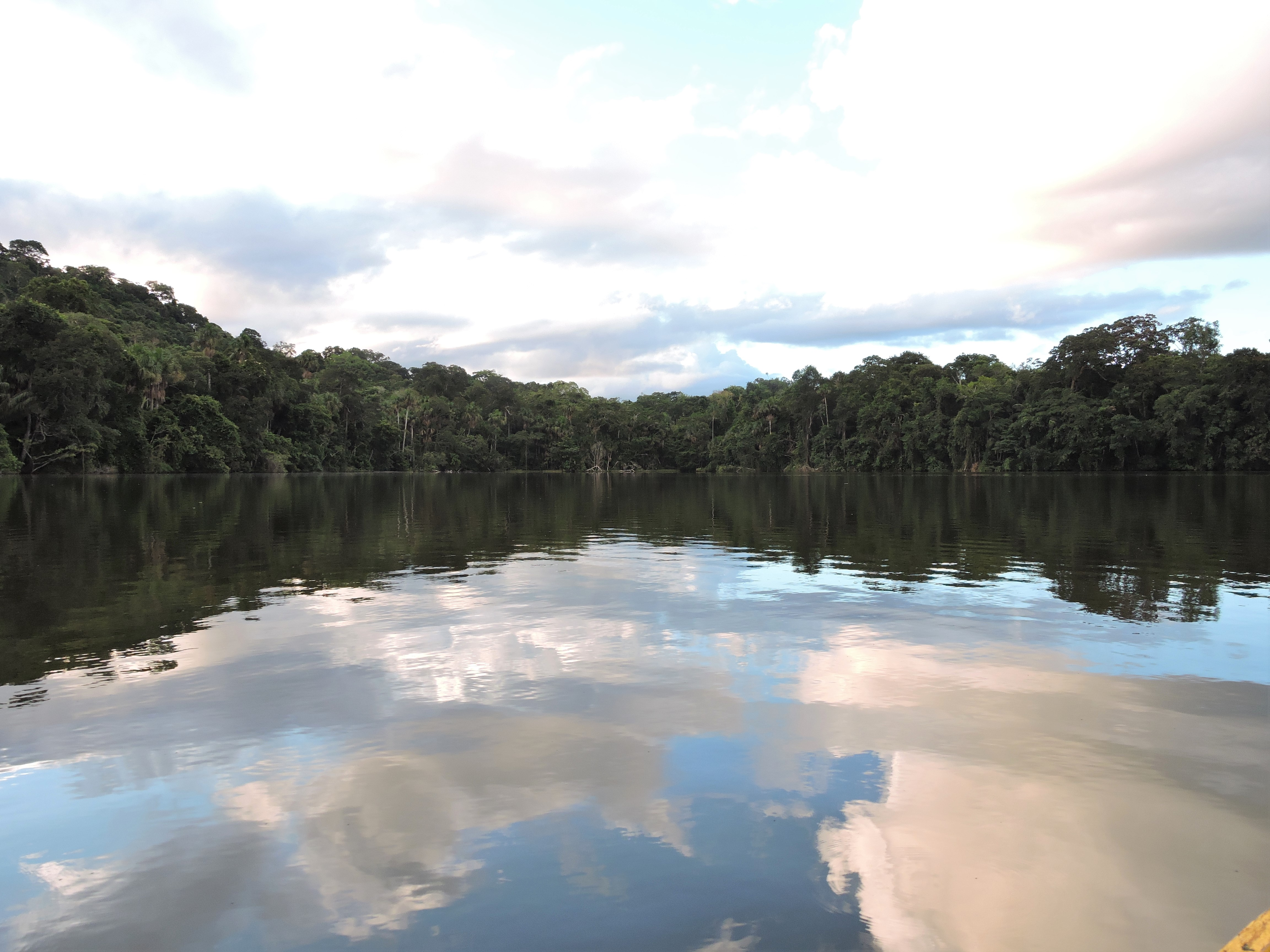 Lago Chalalan